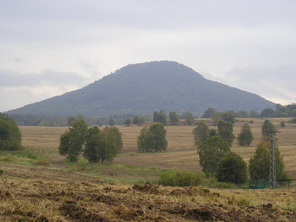 Pohled na Růžovský vrch od obce Růžová. Foceno 26.9.2004. Autor pindick.